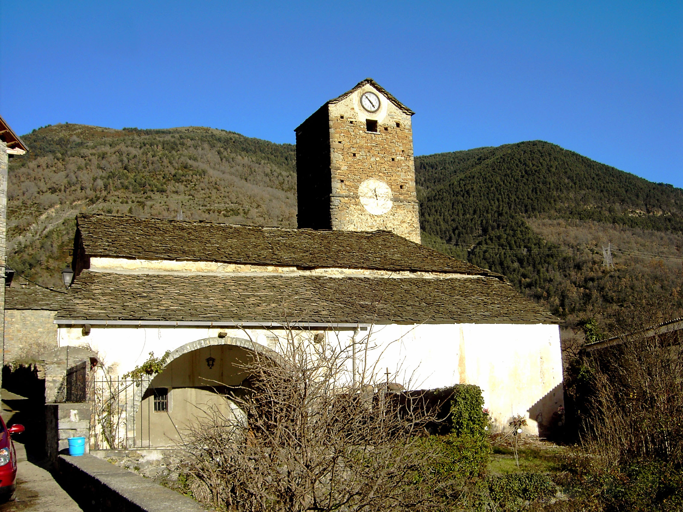 la iglesia de Fragén, en el municipio altoaragonés de Torla.